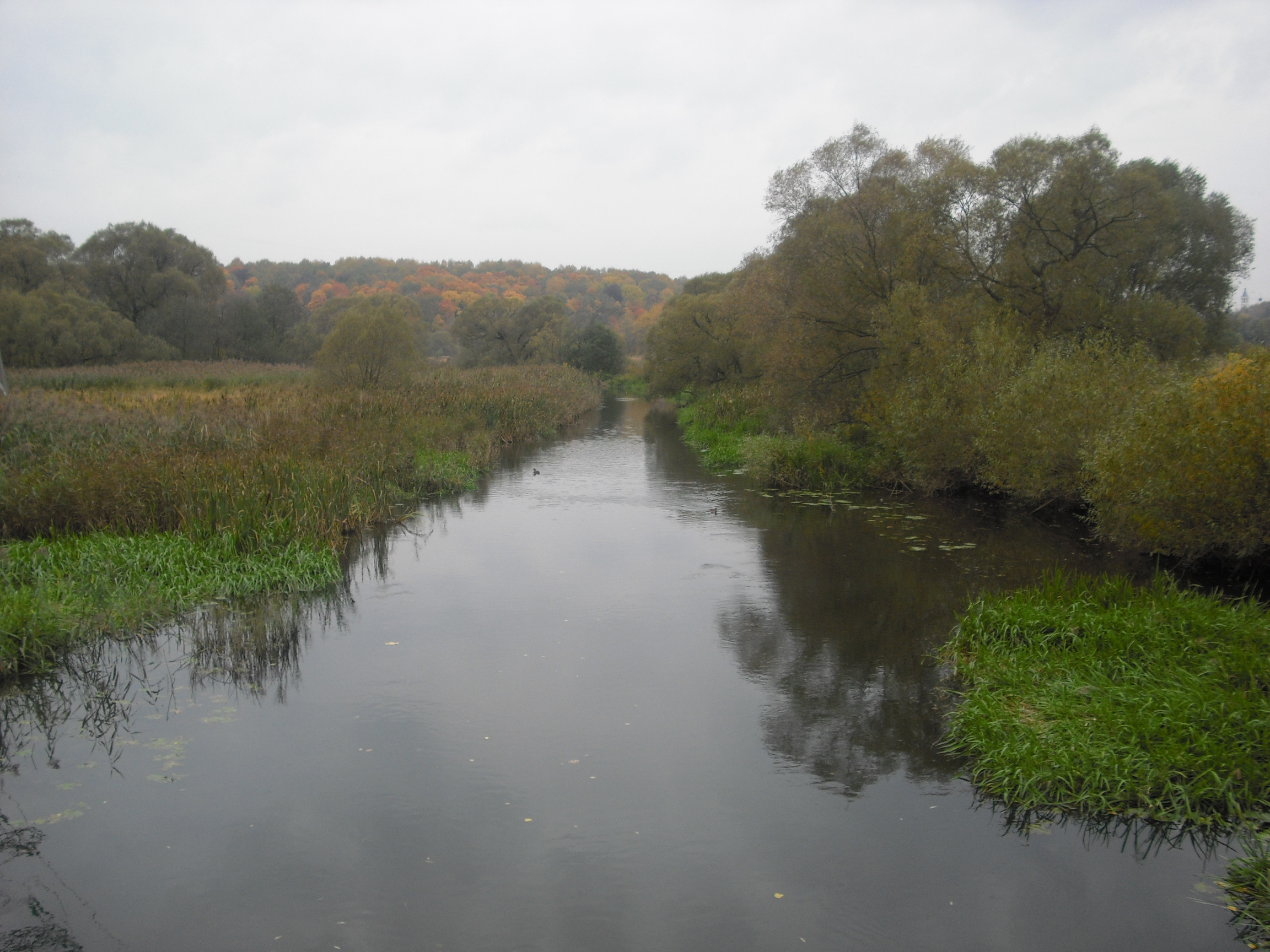 Река Сходня в районе Новобратцево This image is related to the protected area of Russia number 7710106